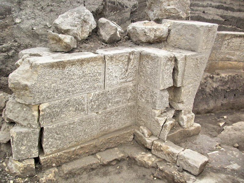 Запазеният във височина каменен зид без спойка от предкамерното правоъгълно помещение.